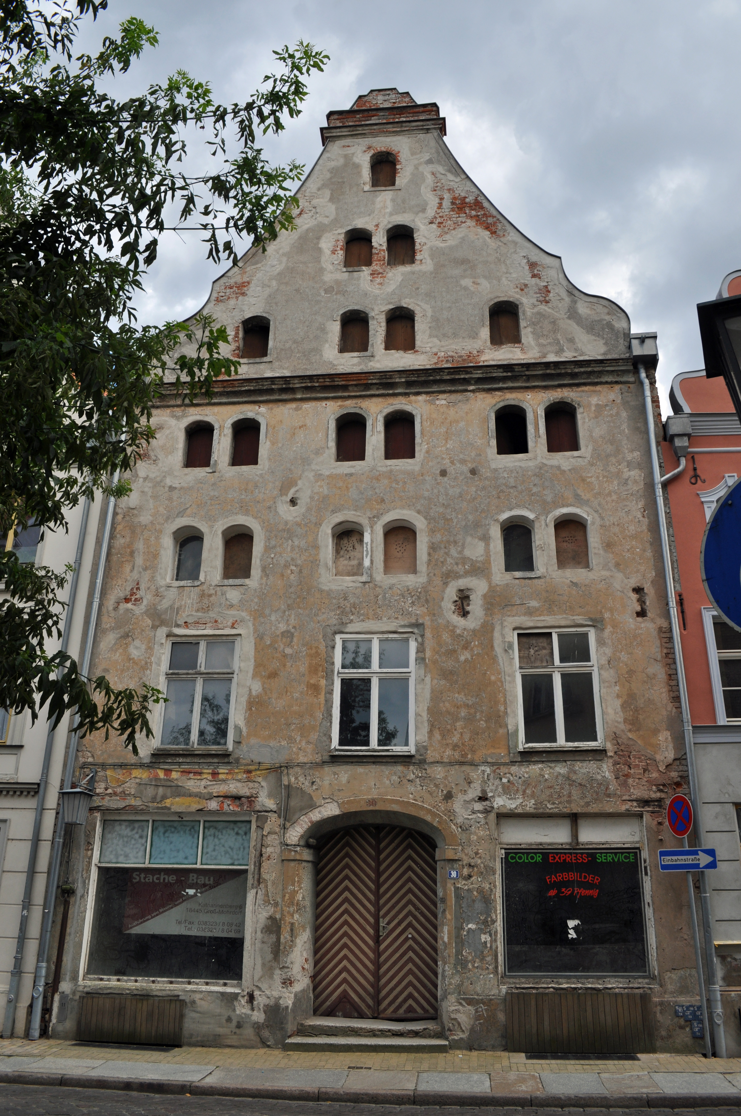 Das Foto zeigt ein Haus (bzw. Details des Hauses) in der Frankenstraße in Stralsund, Deutschland. Die Hausnummer steht im Dateinamen. Aufgenommen am 19. Juli 2011 vom Benutzer:Klugschnacker.